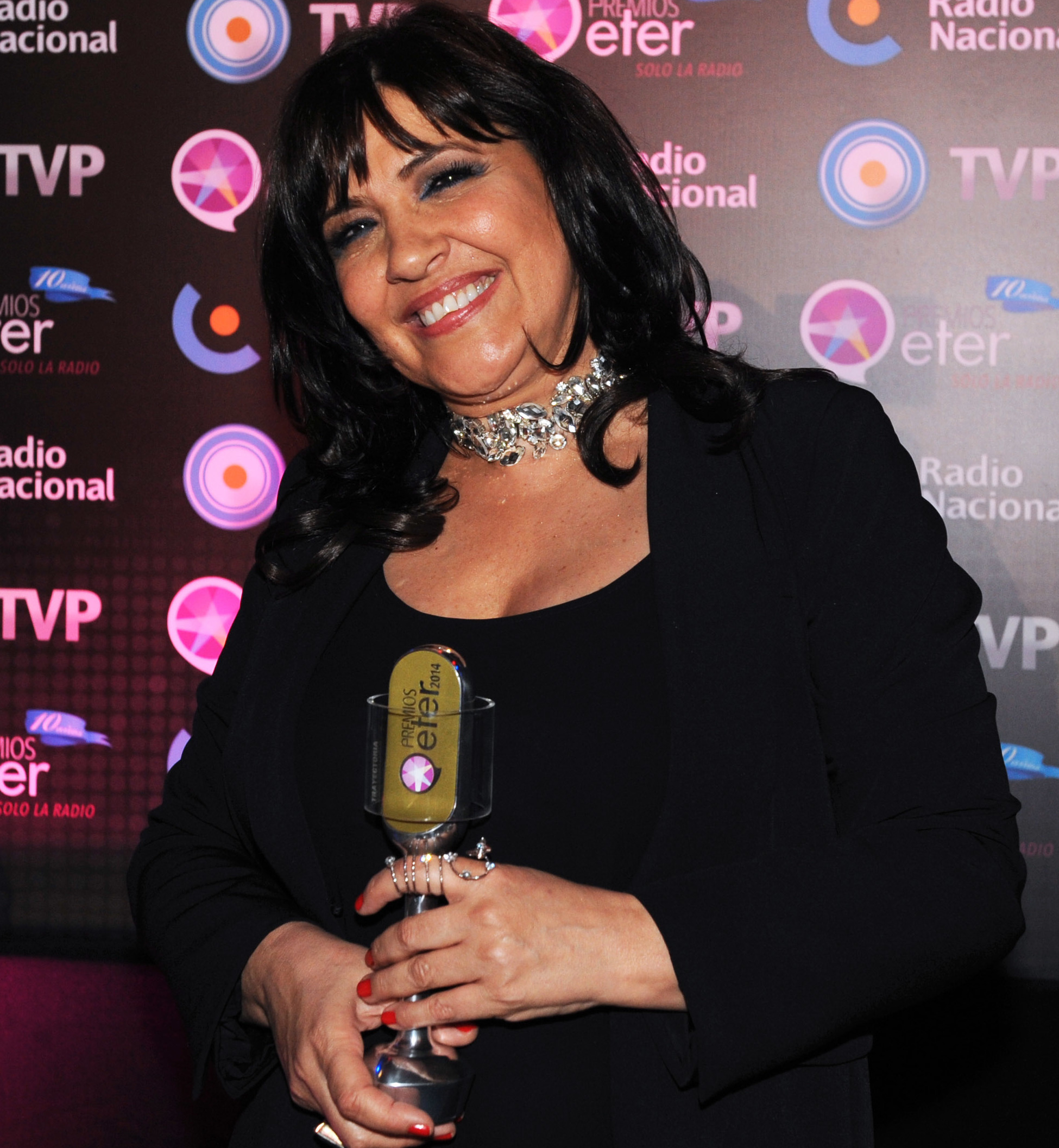 Elizabeth Vernaci en la entrega de los Premios Eter en 2015